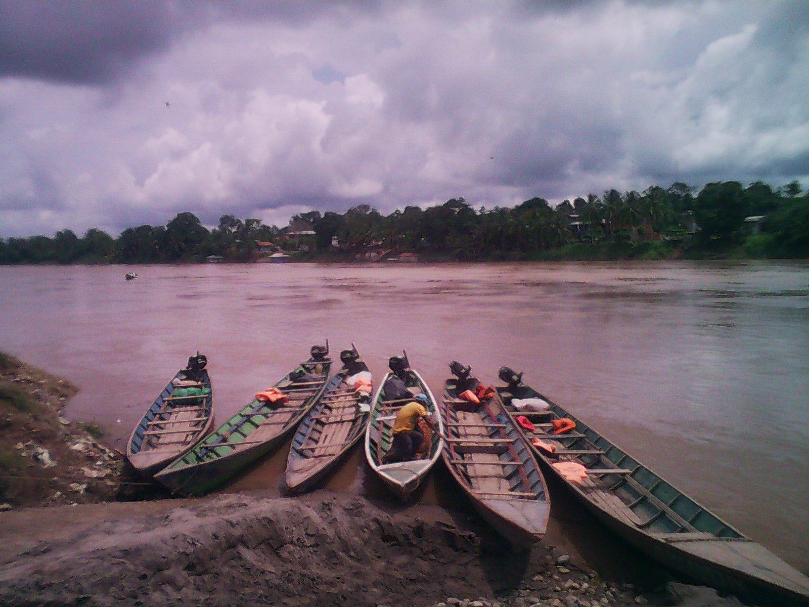 Canoas en el rio Pachitea.